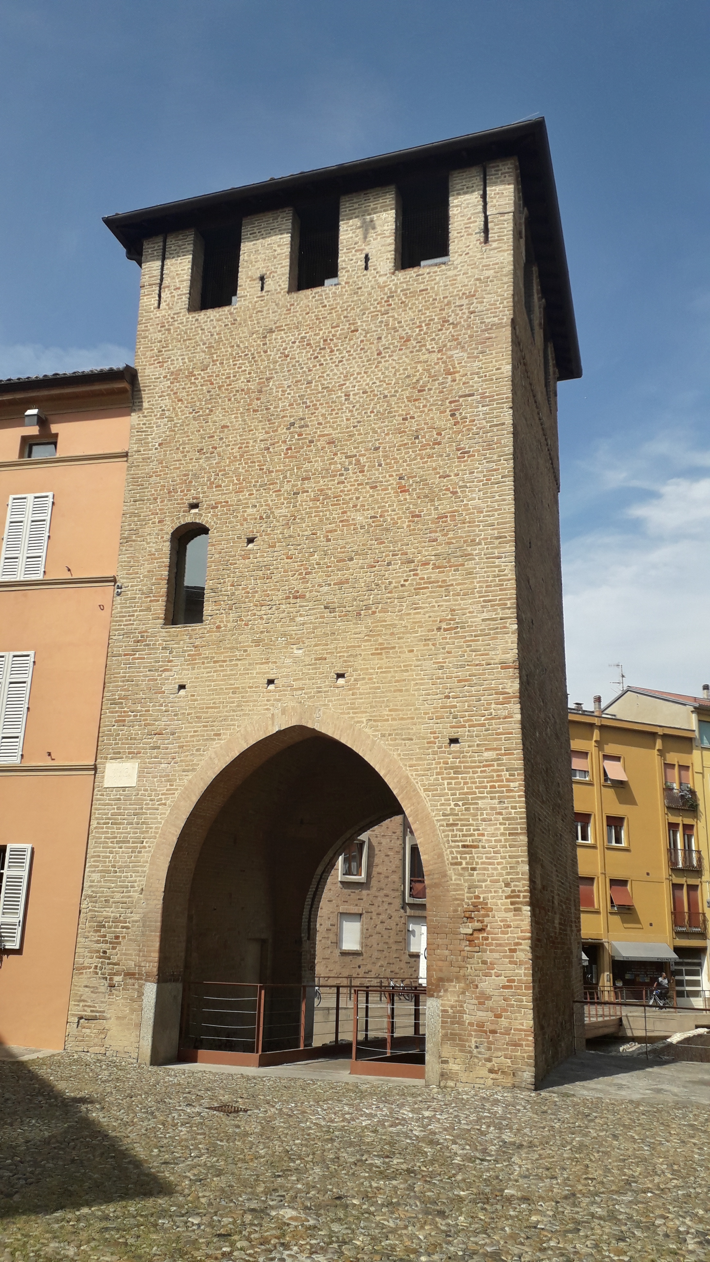 porta di San Donnino This is a photo of a monument which is part of cultural heritage of Italy.